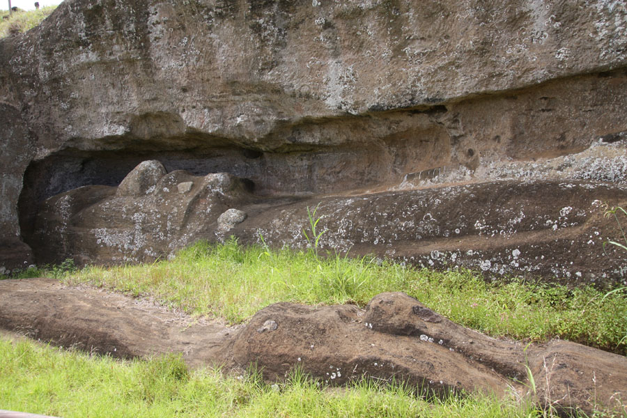 Isla de Pascua This is a photo of a national monument in Chile: 628